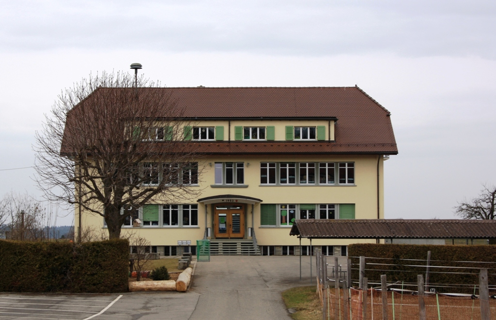 Altes Schulhaus, St. Ursen, Freiburg, Schweiz